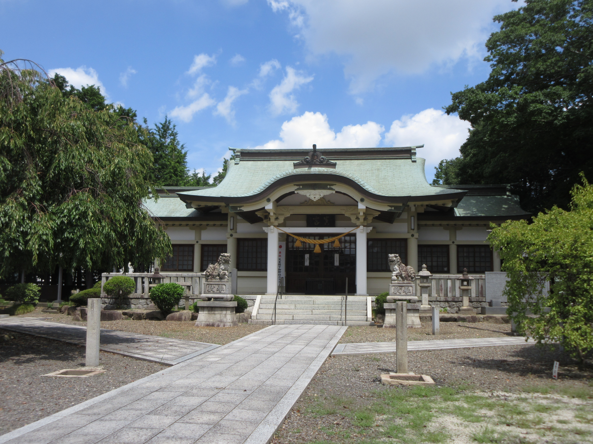 真宮神社（岡崎市真宮町）